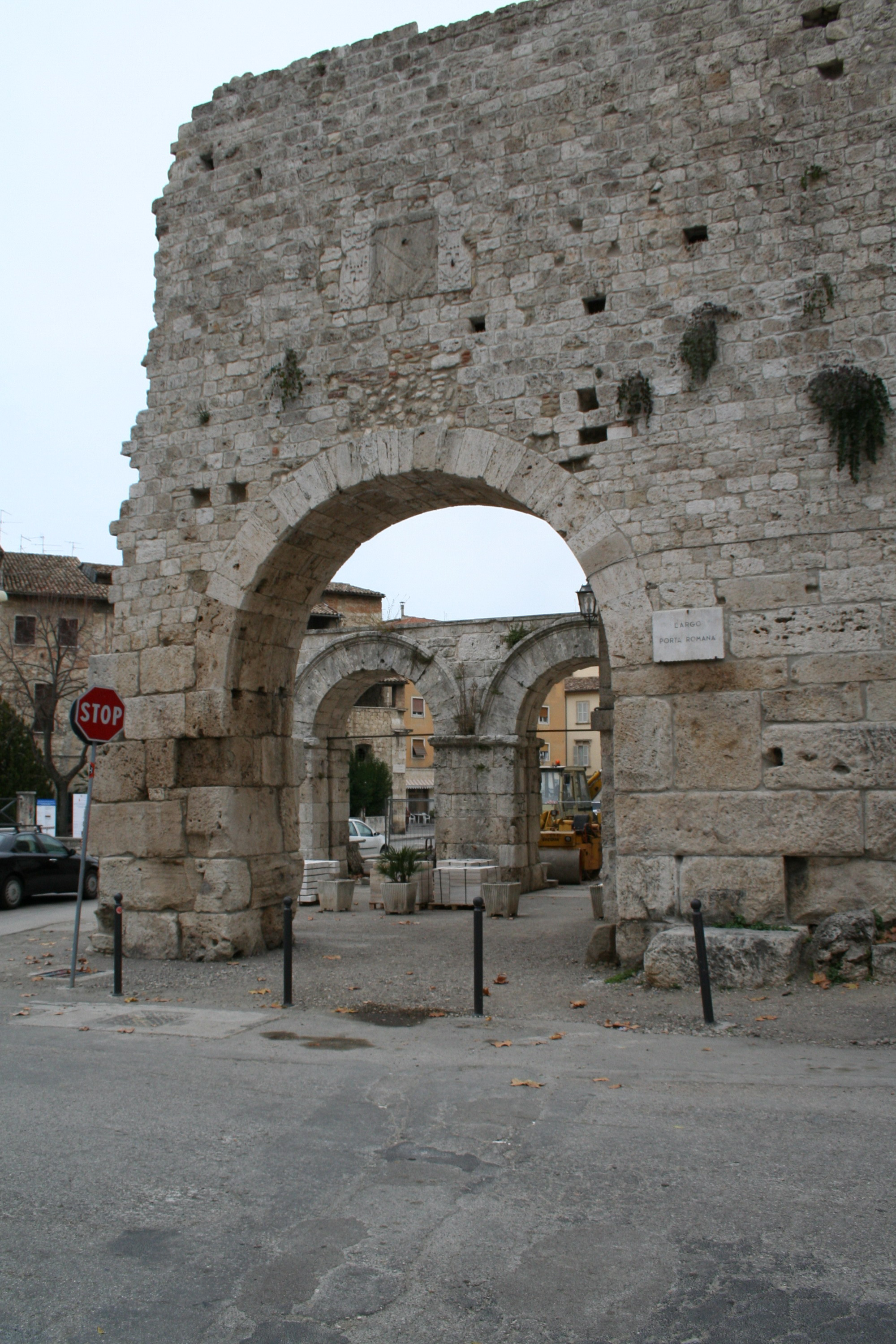 Porta Romana di Ascoli Piceno, esterno giorno, proprio scatto Sibilla.io "Utilizzo concesso" Ticket#2007040410014627 (ticket per le immagini) This file is licensed under Creative Commons 3.0 license